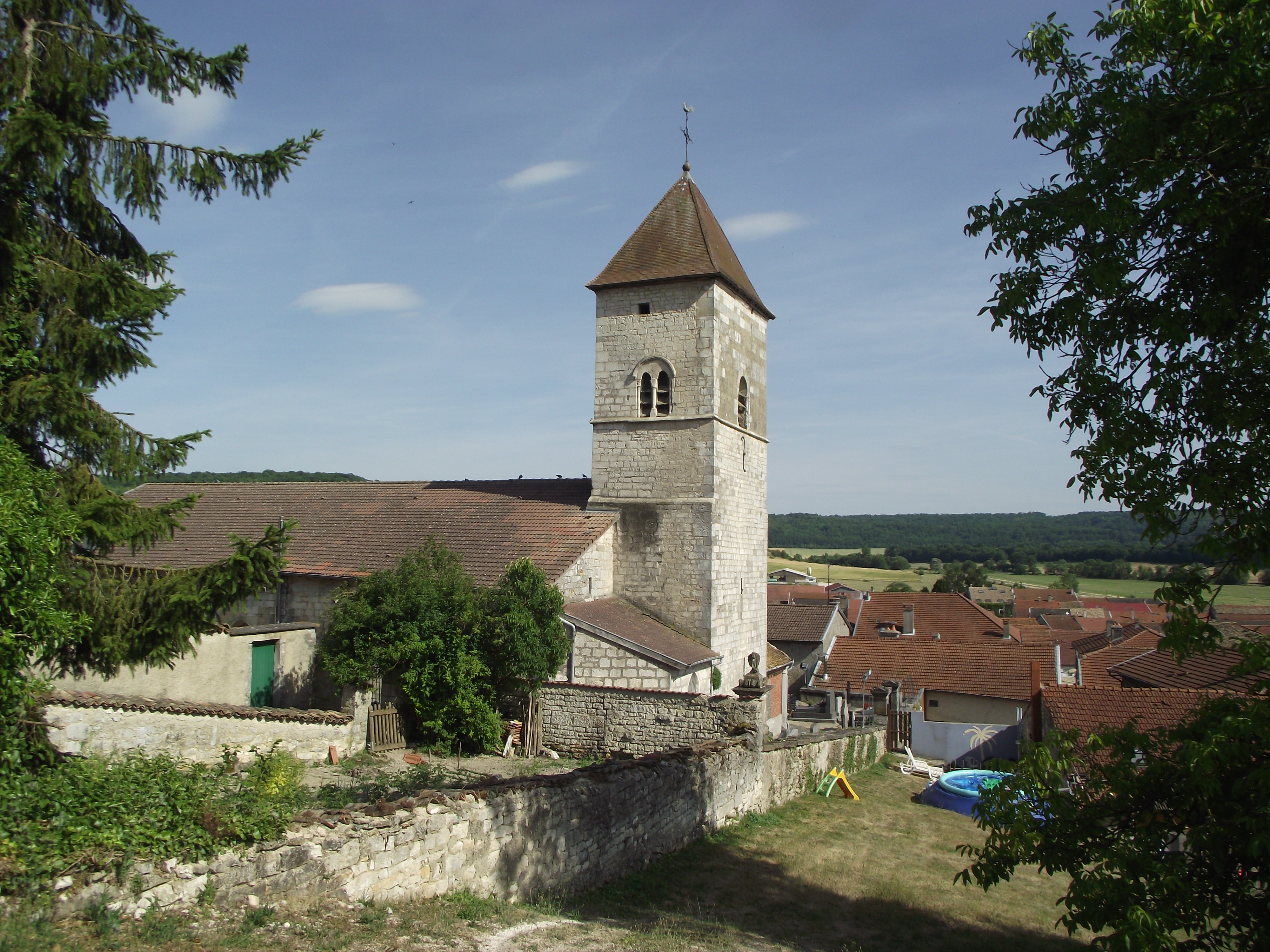 Église Saint-Grégoire-le-Grand à Pagny-la-Blanche-Côte (le clocher)